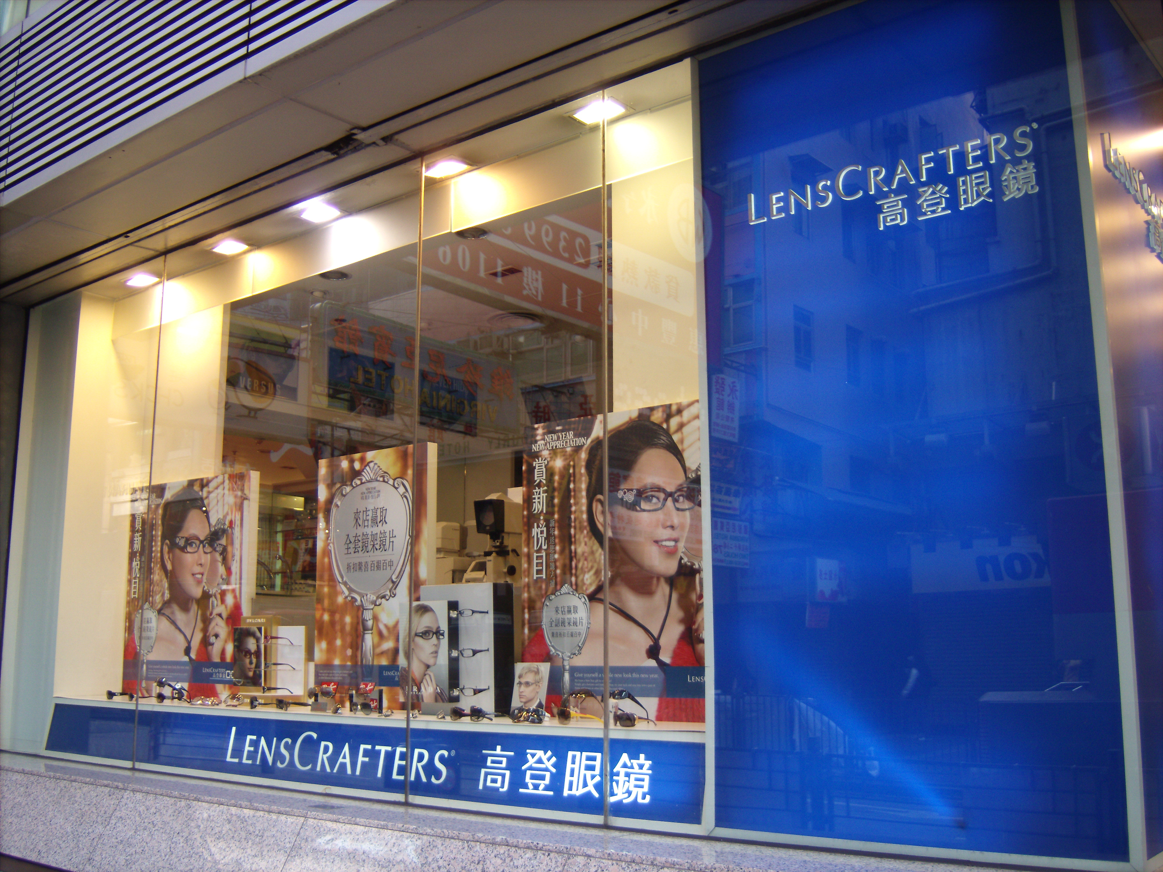 A LensCrafters Store in Mongkok, Hong Kong.